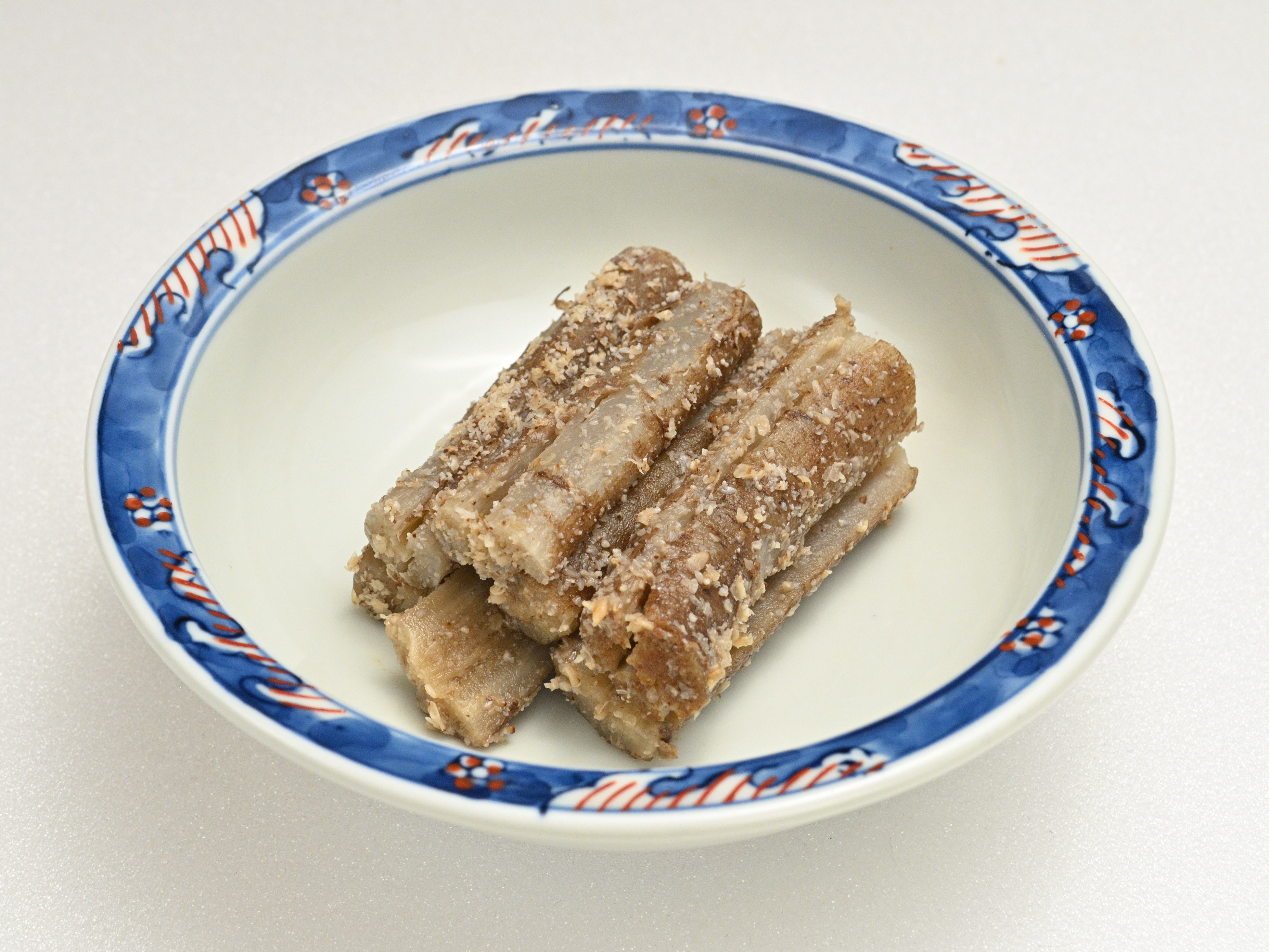 おせち料理のたたき牛蒡